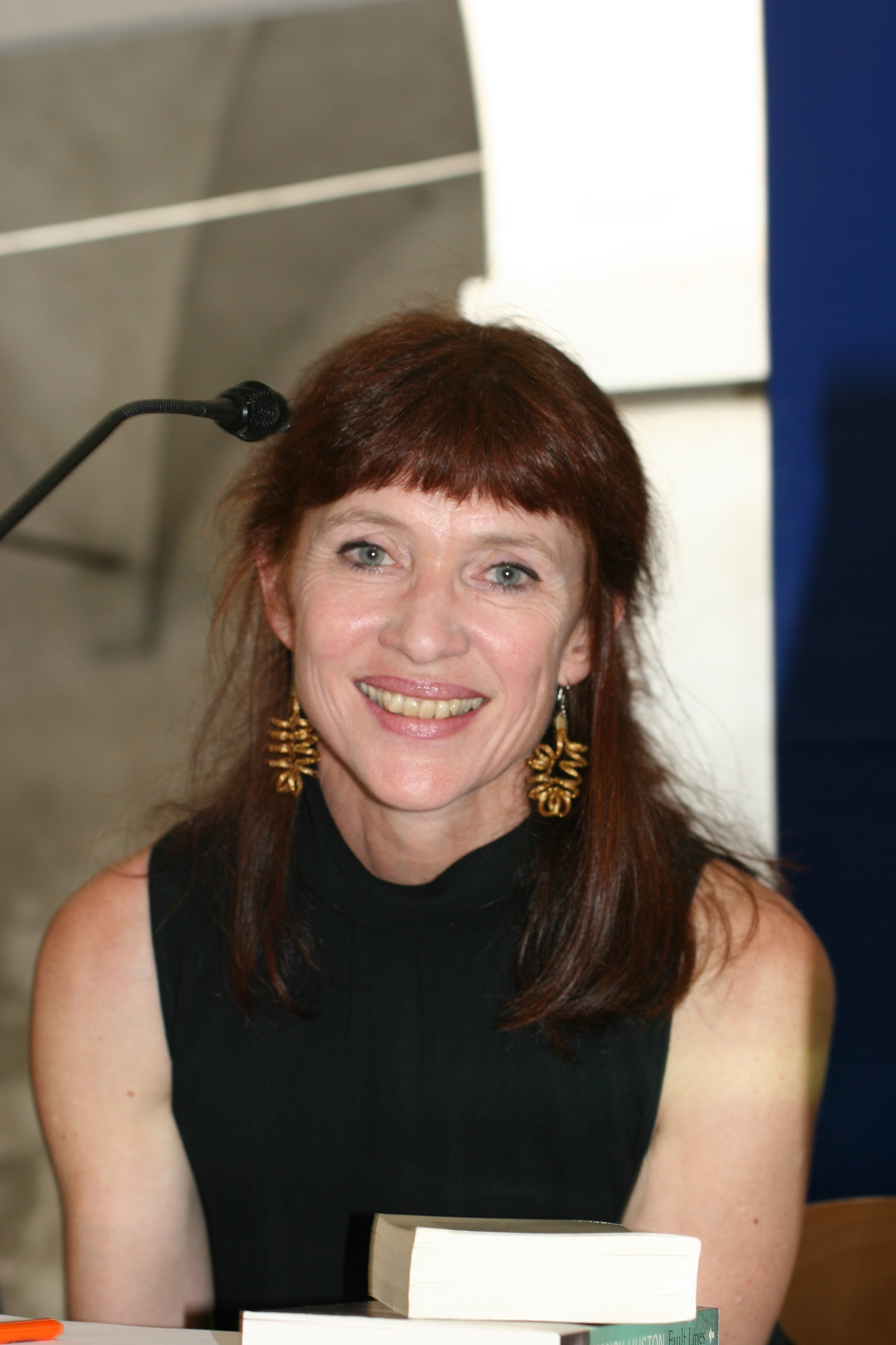 La scrittrice canadese Nancy Huston